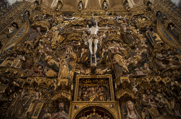 Cartuja de Miraflores, Burgos.